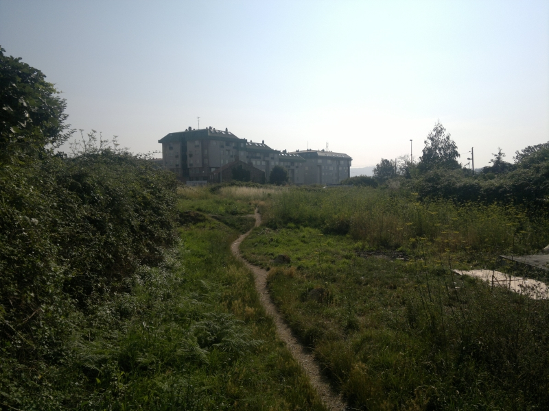 Agramonte, A Coruña